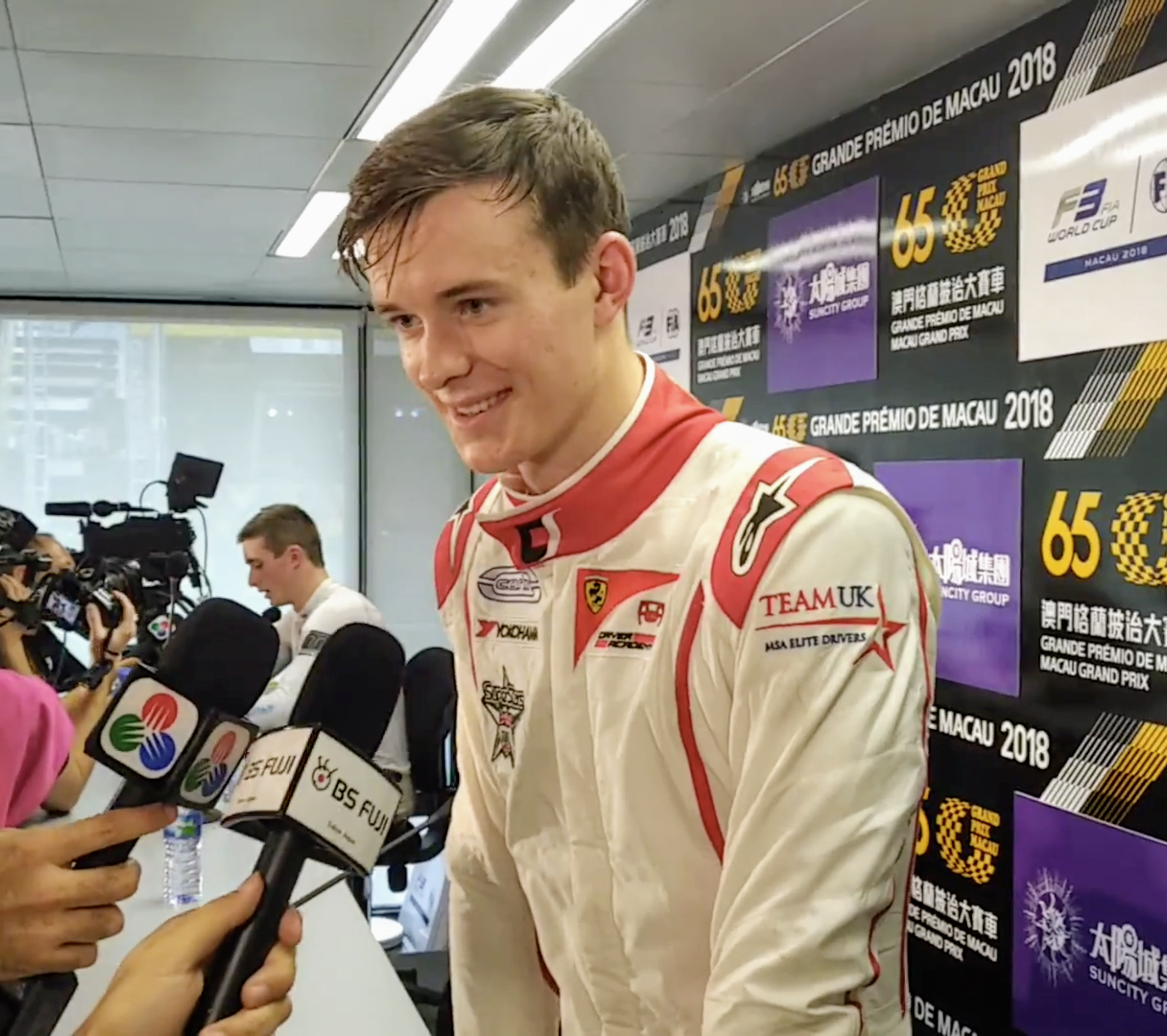 Callum Ilott em Grande Prémio de Macau 2018